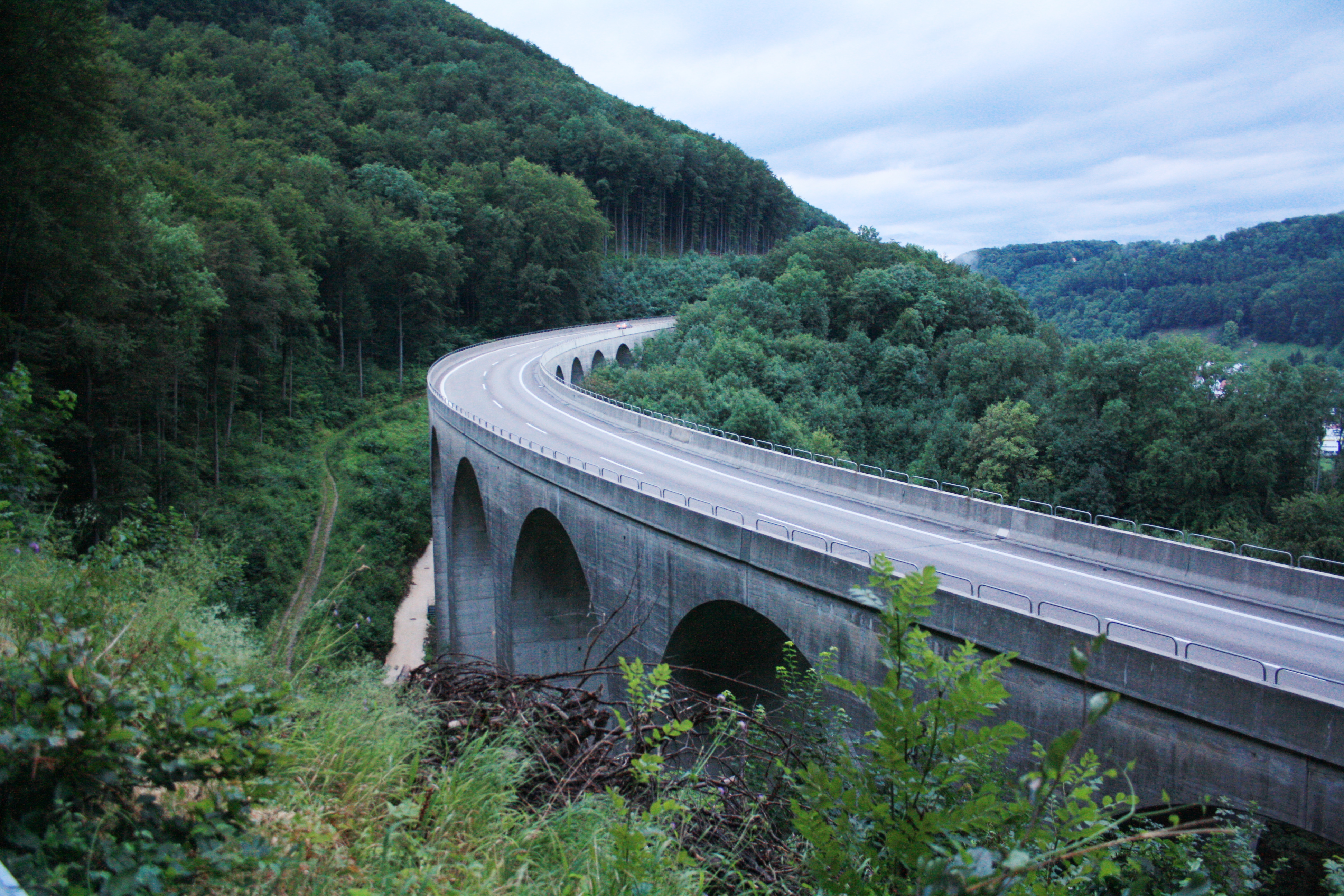 Hangbrücke Todsburg der Bundesautobahn 8 beim Albaufstieg kurz nach der Anschlussstelle Mühlhausen. Zu sehen ist die Richtungsfahrbahn Stuttgart-Ulm. Rechts im Tal der Fils hinter den Bäumen sind Teile der Stadt Wiesensteig zu erkennen.